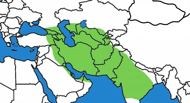 گسترۀ فتوحات نادرشاه افشار